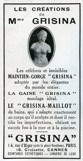 Grisina